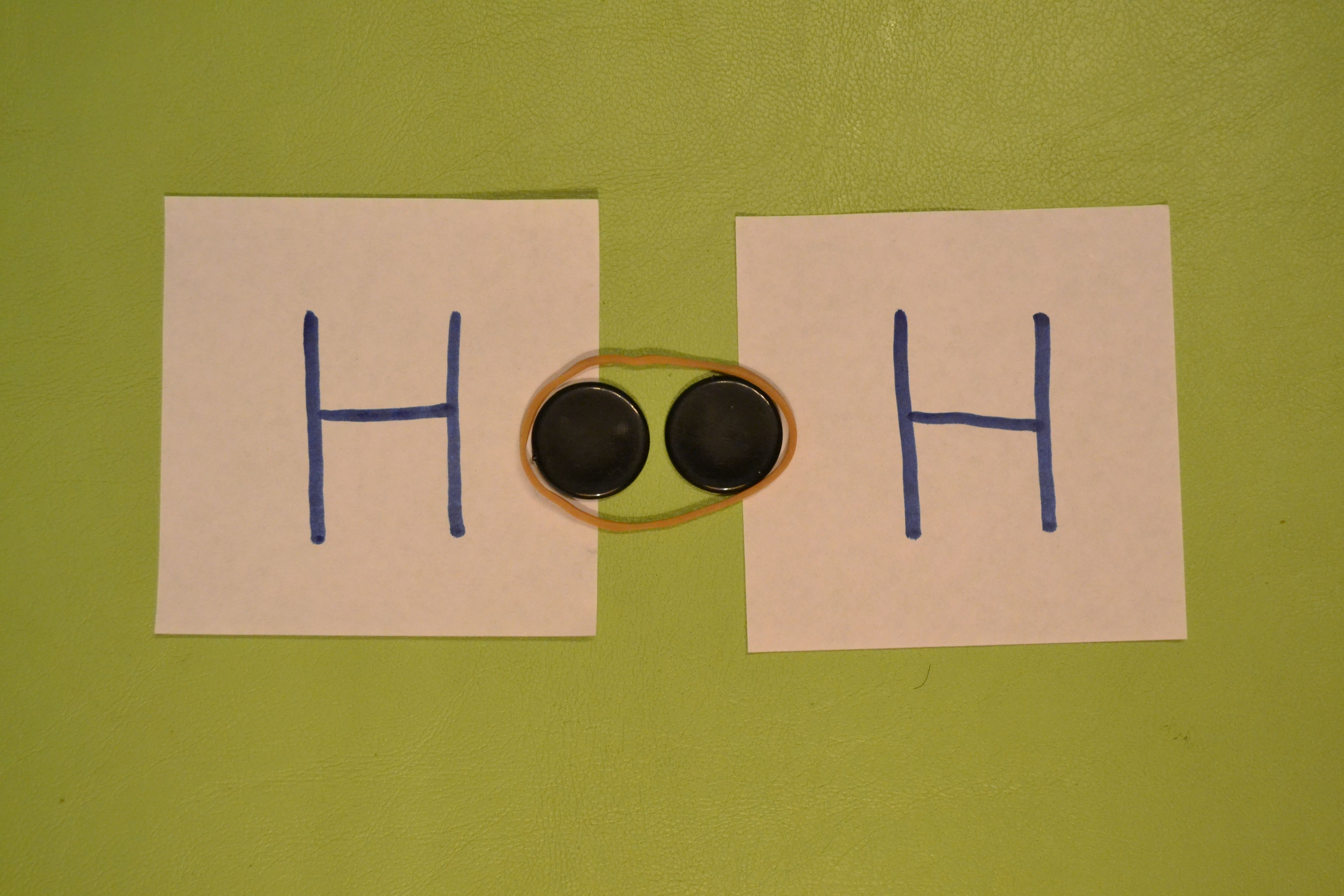 Electrones de la última capa de 2 átomos de Hidrógeno